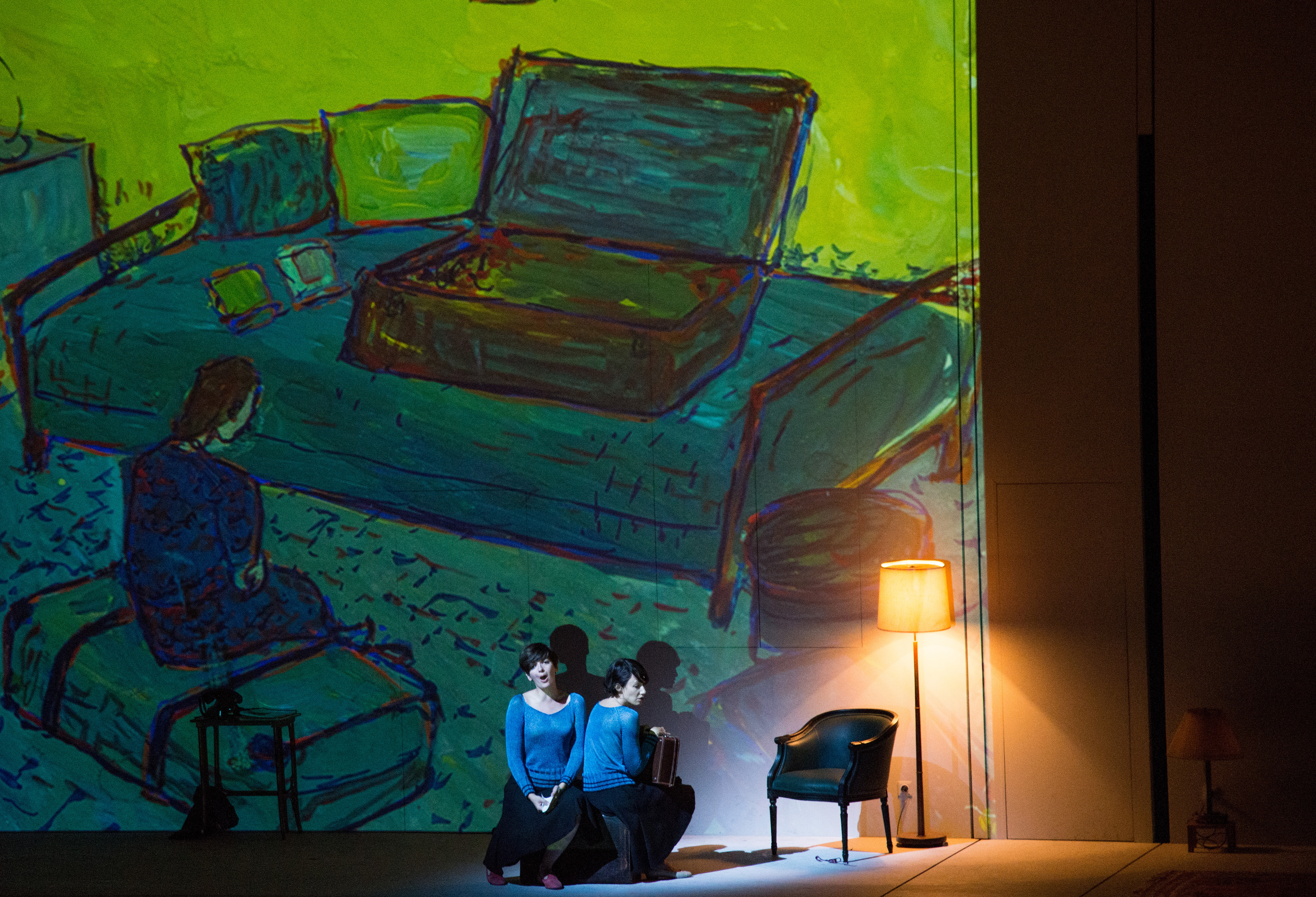 Charlotte Salomon, opera by Marc-André Dalbavie, Salzburg Festival, 2014